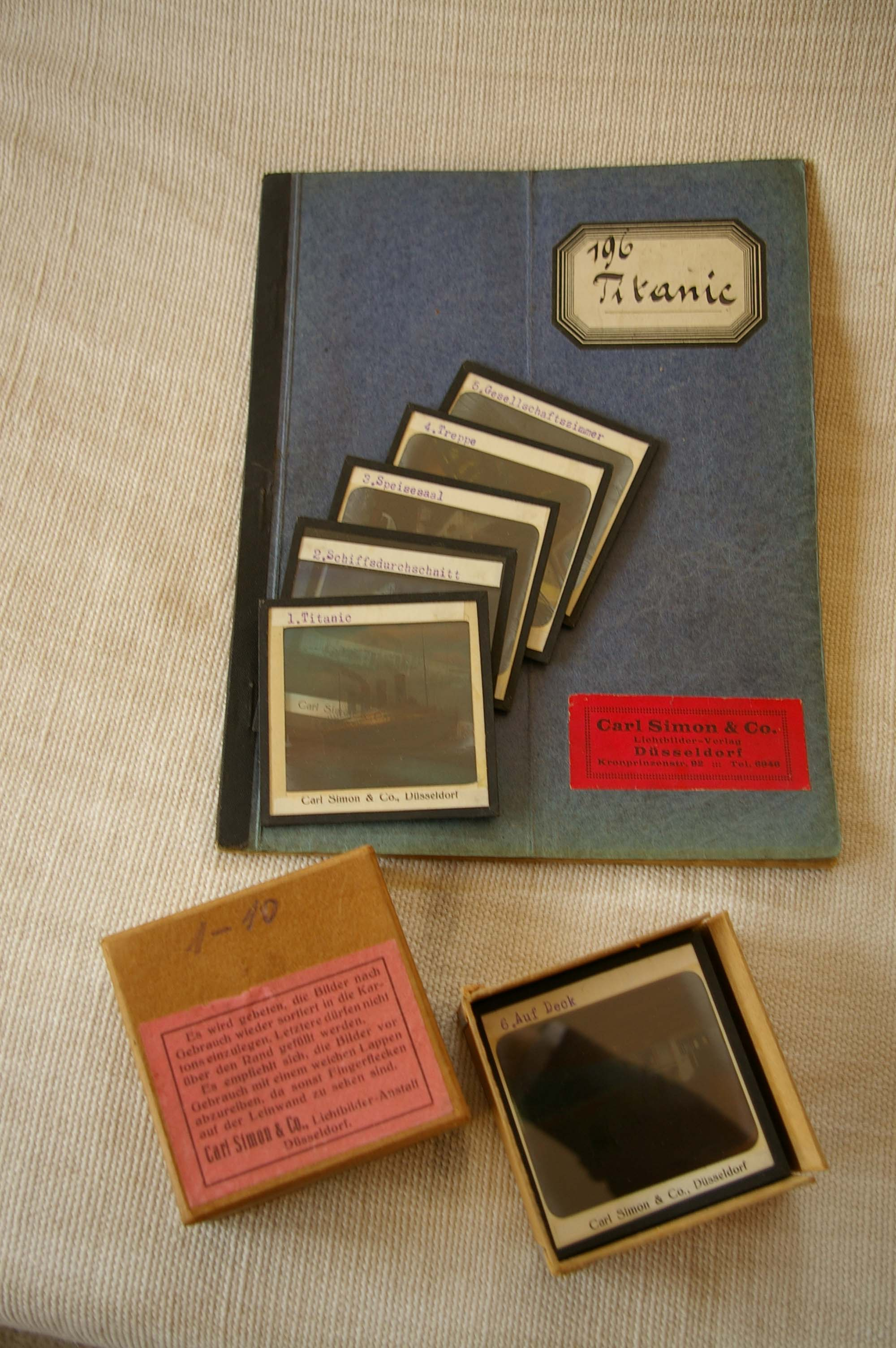 Vortragsheft und Diapositiv